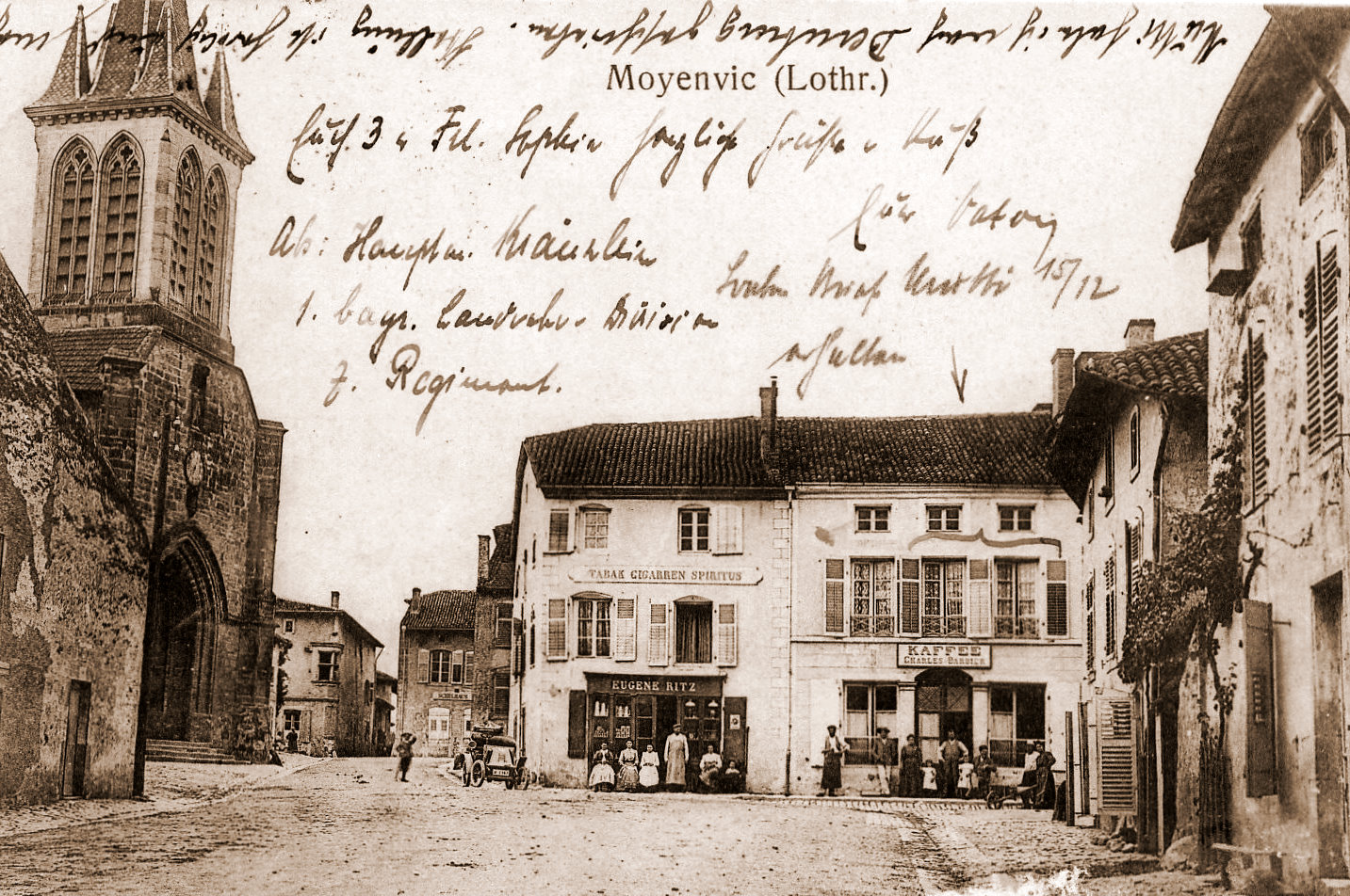 Moyenvic